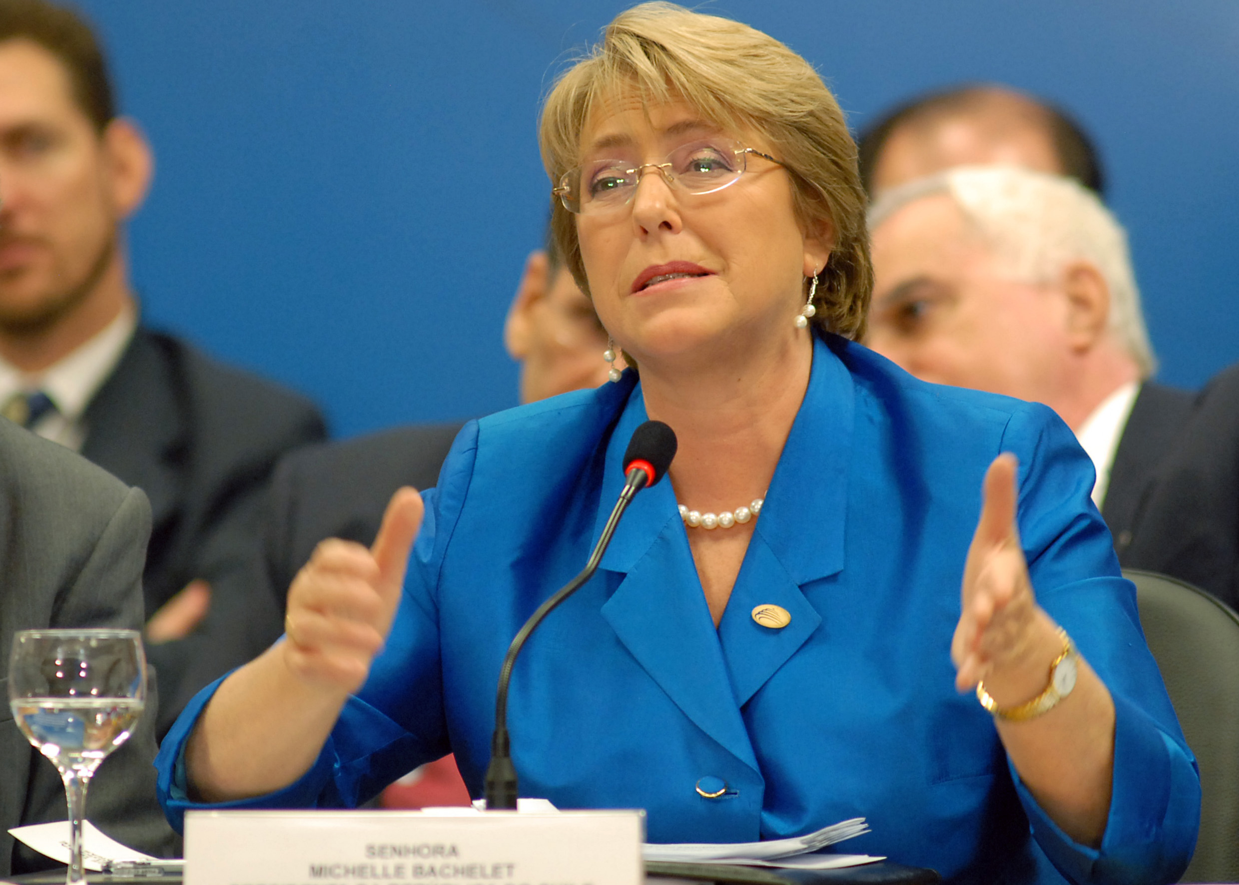 Brasília - Presidente do Chile, Michelle Bachelet, durante reunião União de Nações Sul-Americanas (Unasul). O encontro servirá para que os representantes assinem o tratado de constituição da organização, que existe apenas informalmente.